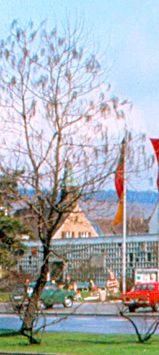 Heilbronn, Pauluskirche (1949–1972) Entwurf Architekt Hannes Mayer, Bauleitung Architekt Kübler